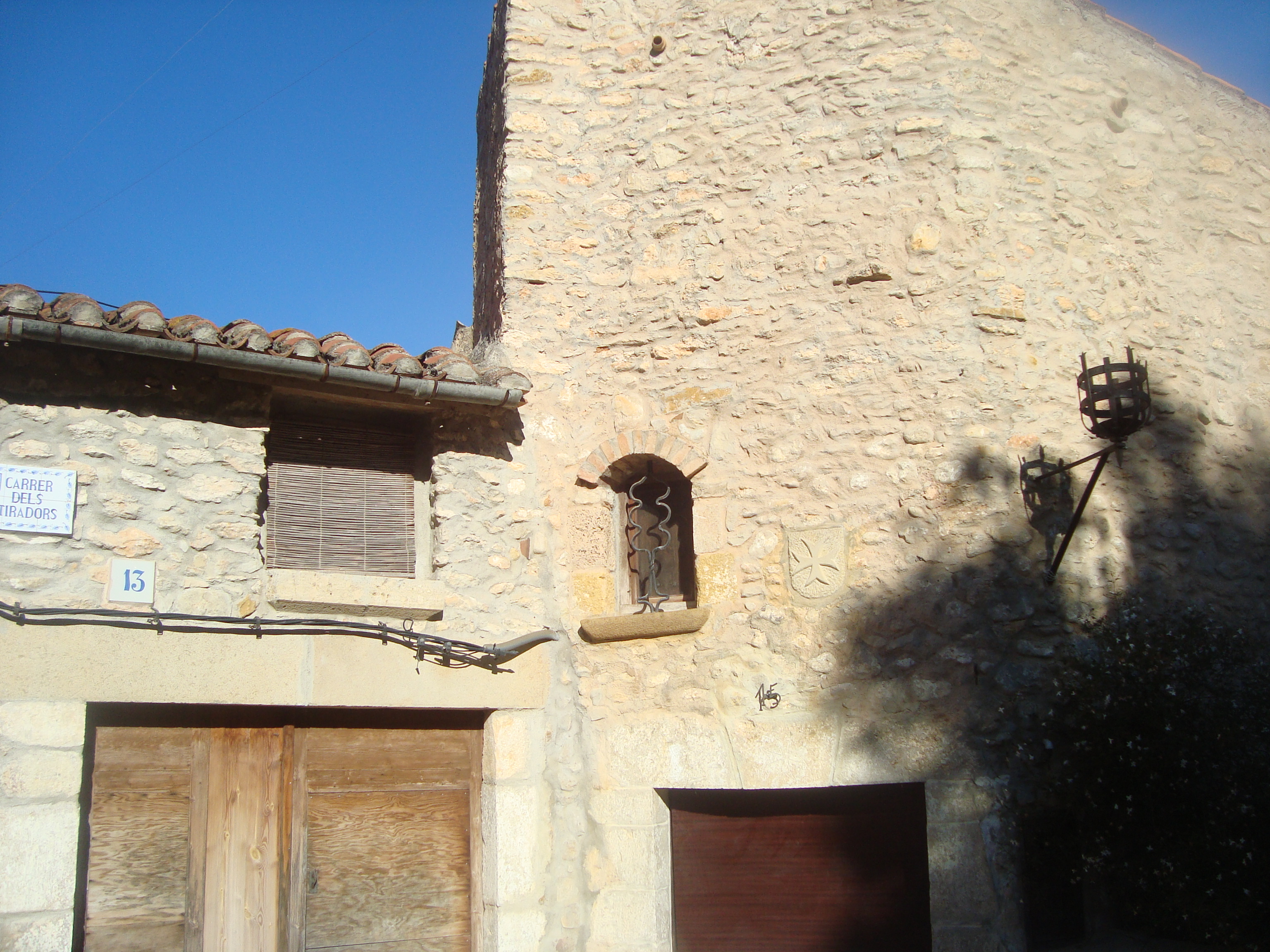 Casa fortificada dels Templaris (Les Coves de Vinromà) 05.050-005.